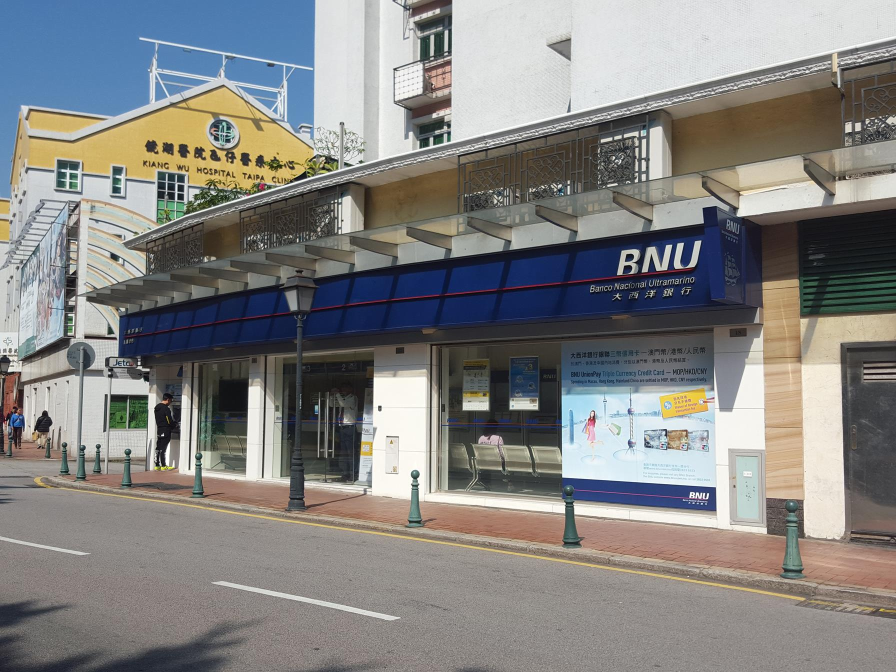 Banco Nacional Ultramarino